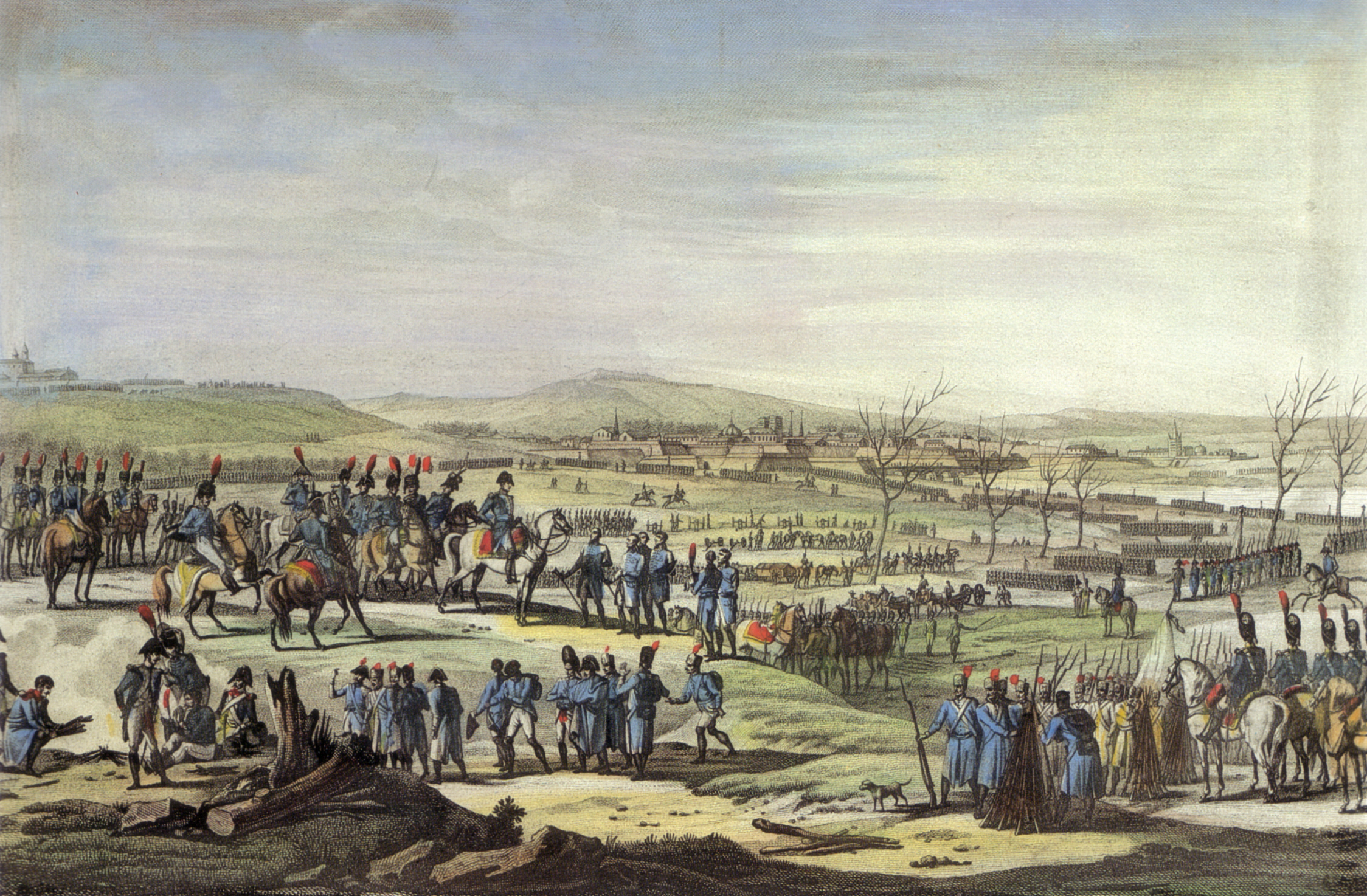 aus "Campagne des Francaises", Paris 1817